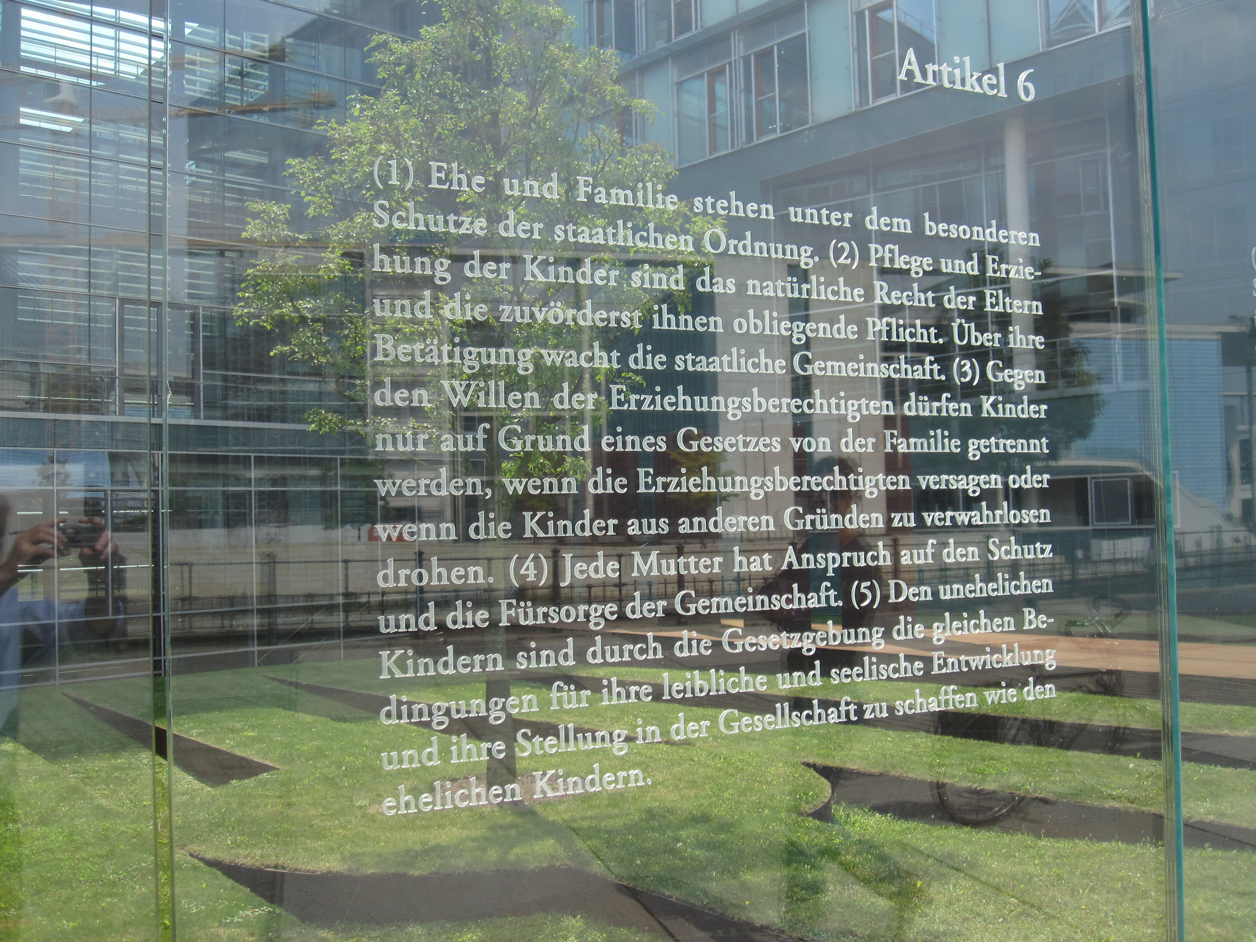 Bundestagsgebäude in Berlin: Der israelische Künstler Dani Karavan hat in drei Meter hohe Glasscheiben, die einen Außenhof des Jakob-Kaiser-Hauses im Uferbereich zur Spree begrenzen, die 19 Grundrechtsartikel des Grundgesetzes mit Laser eingraviert. „Die Grundrechtsartikel schweben gleichsam in Augenhöhe vor dem Haus der Fraktionen, dem Jakob-Kaiser-Haus“ (Andreas Kaernbach, Deutscher Bundestag).